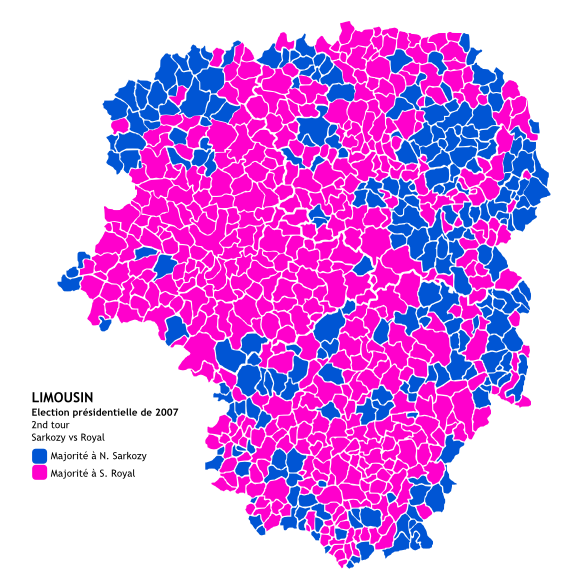 Carte des résultats du 2nd tour de l'élection présidentielle 2007 par commune, en Limousin